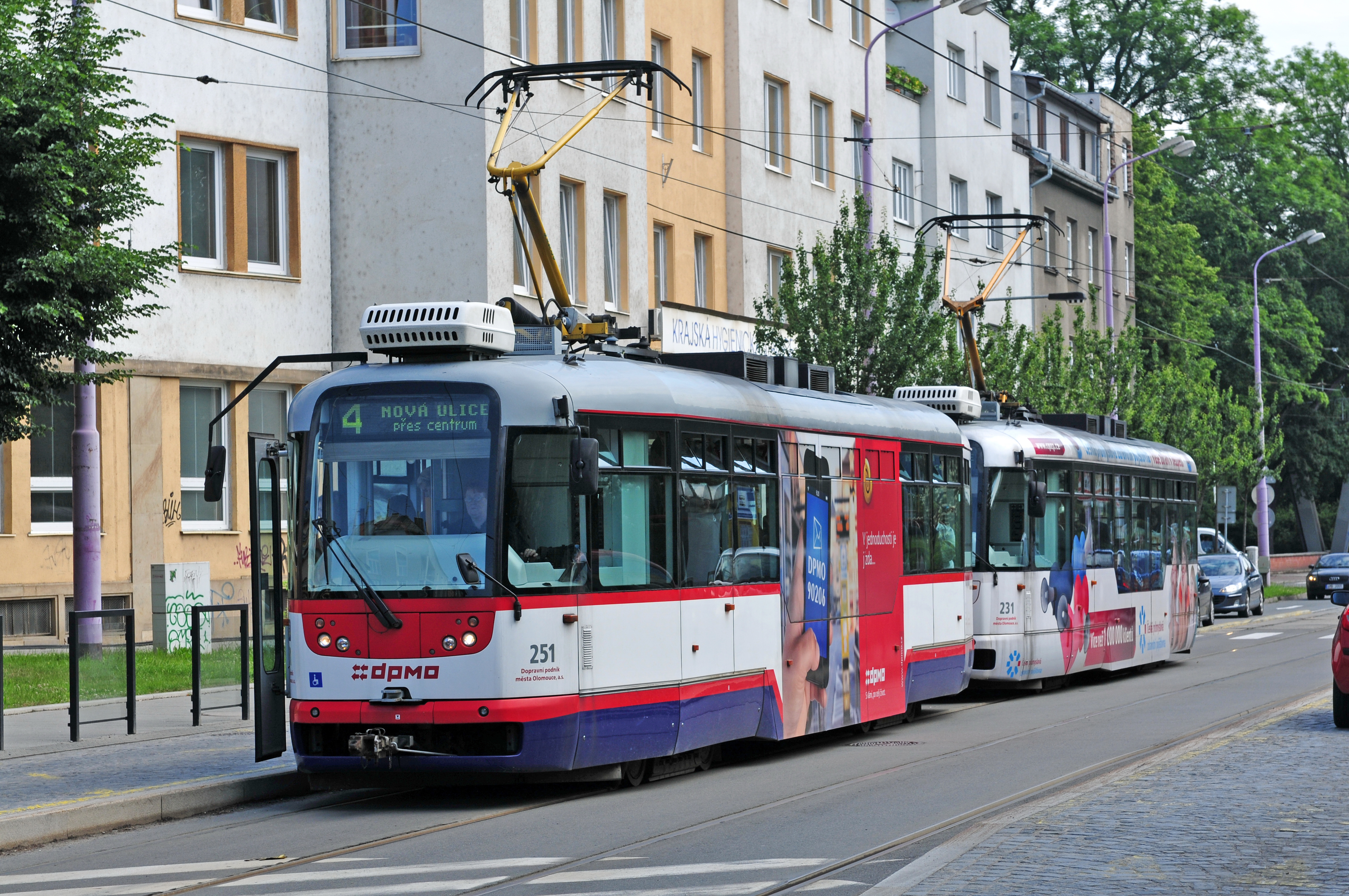 Olomouc